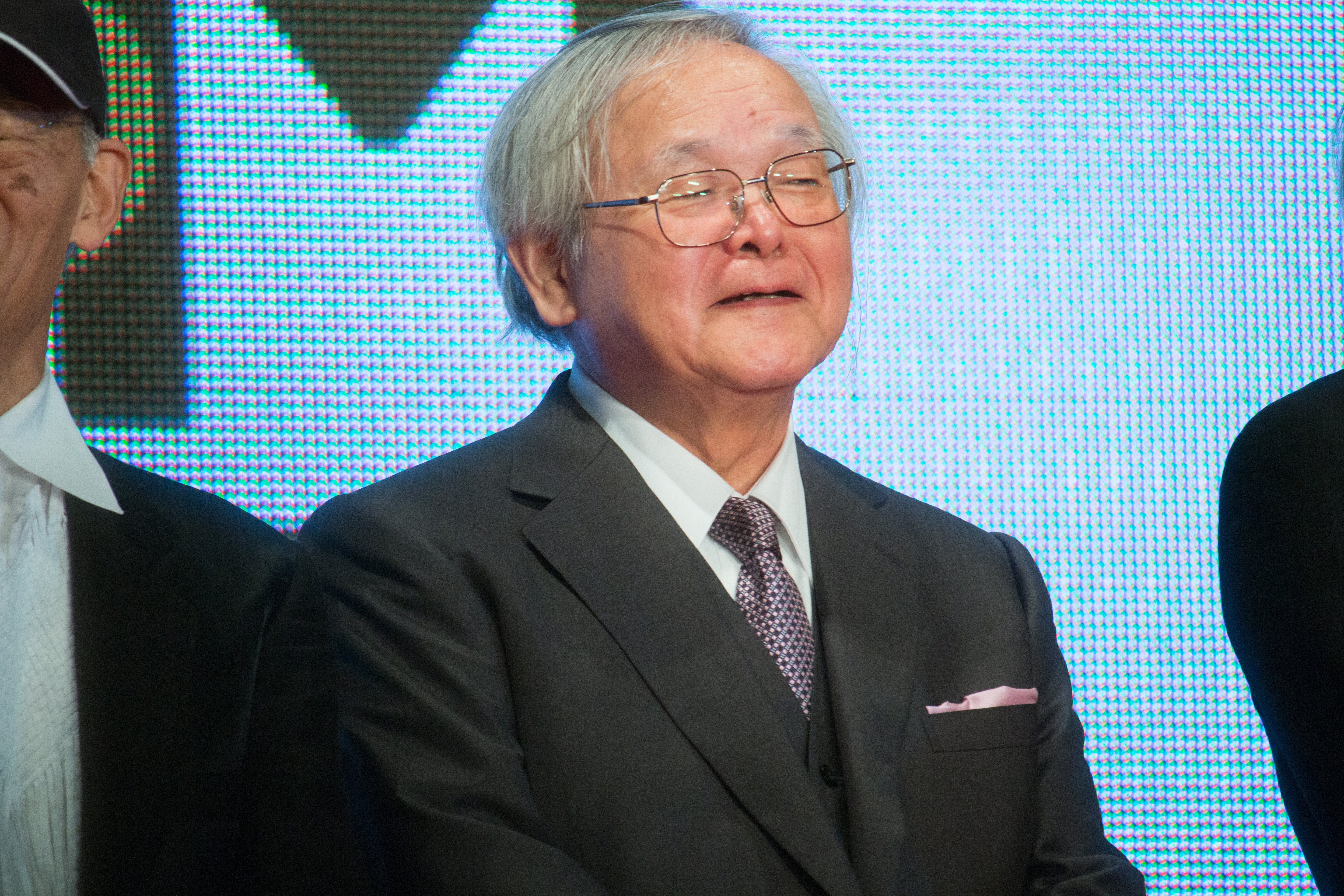 第28回 東京国際映画祭 オープニングセレモニー 安彦良和 (ガンダムとその世界)